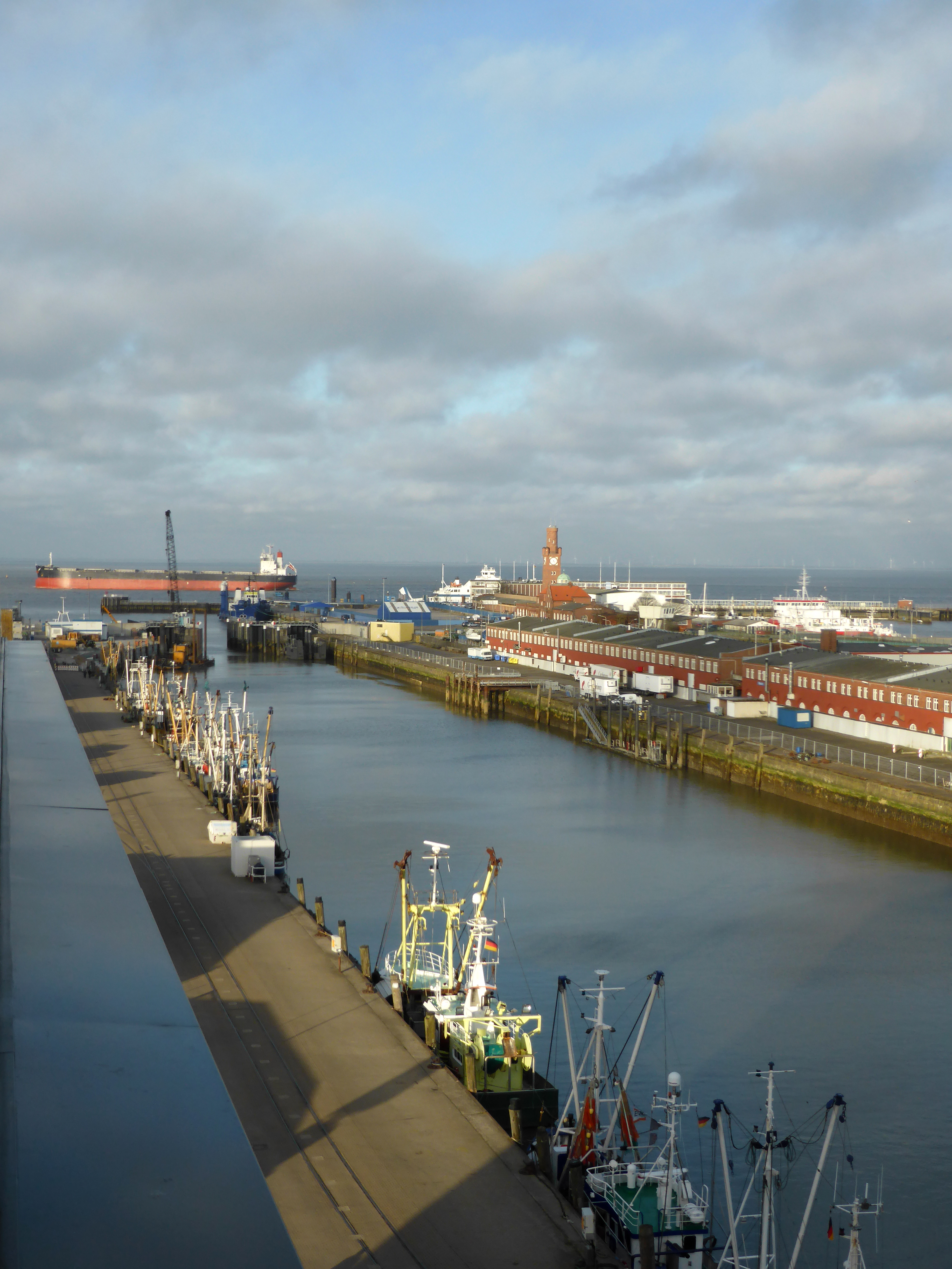 AdminCon 2016 - Hafengebiet Cuxhaven